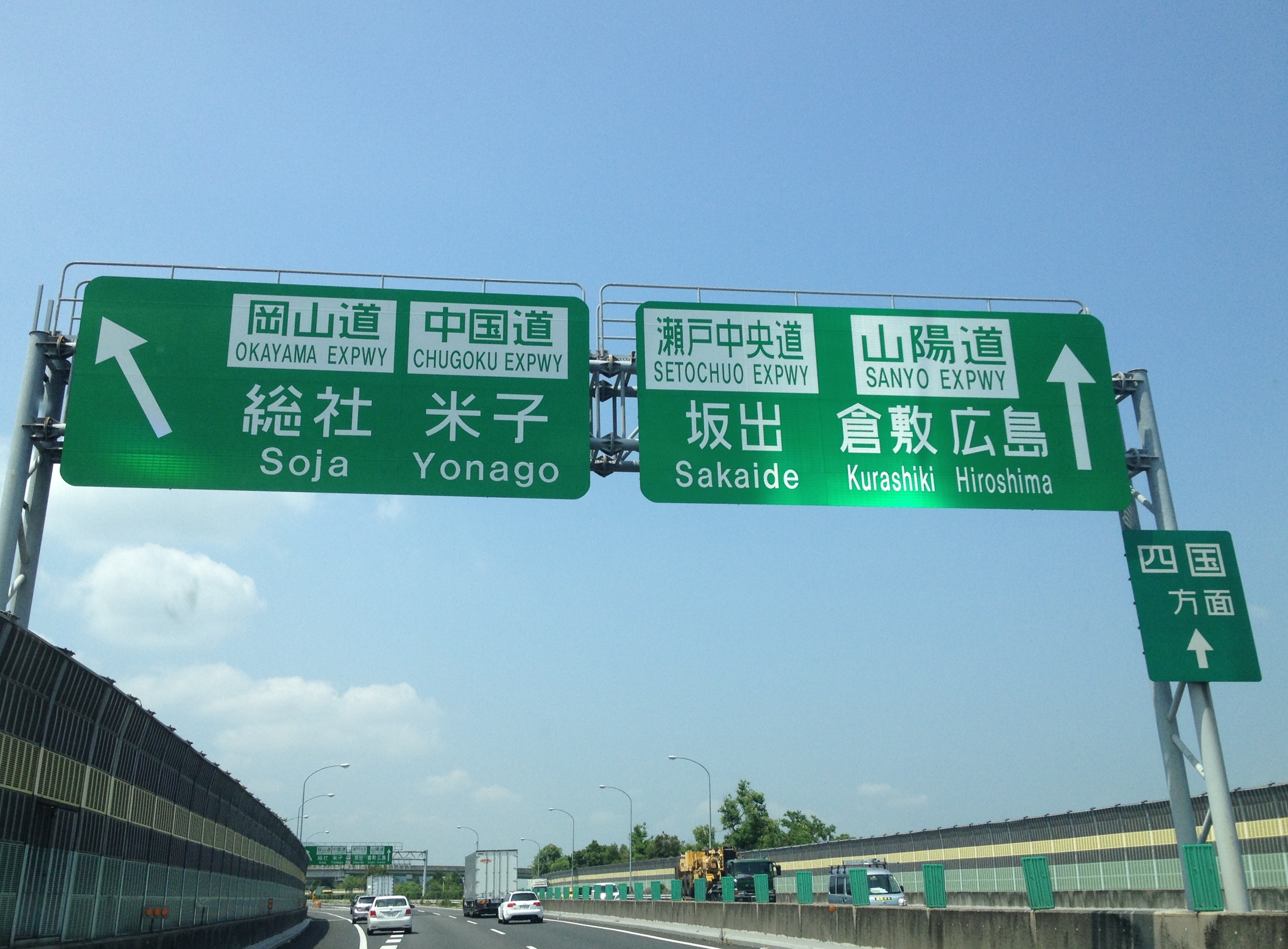 岡山JCTの標識